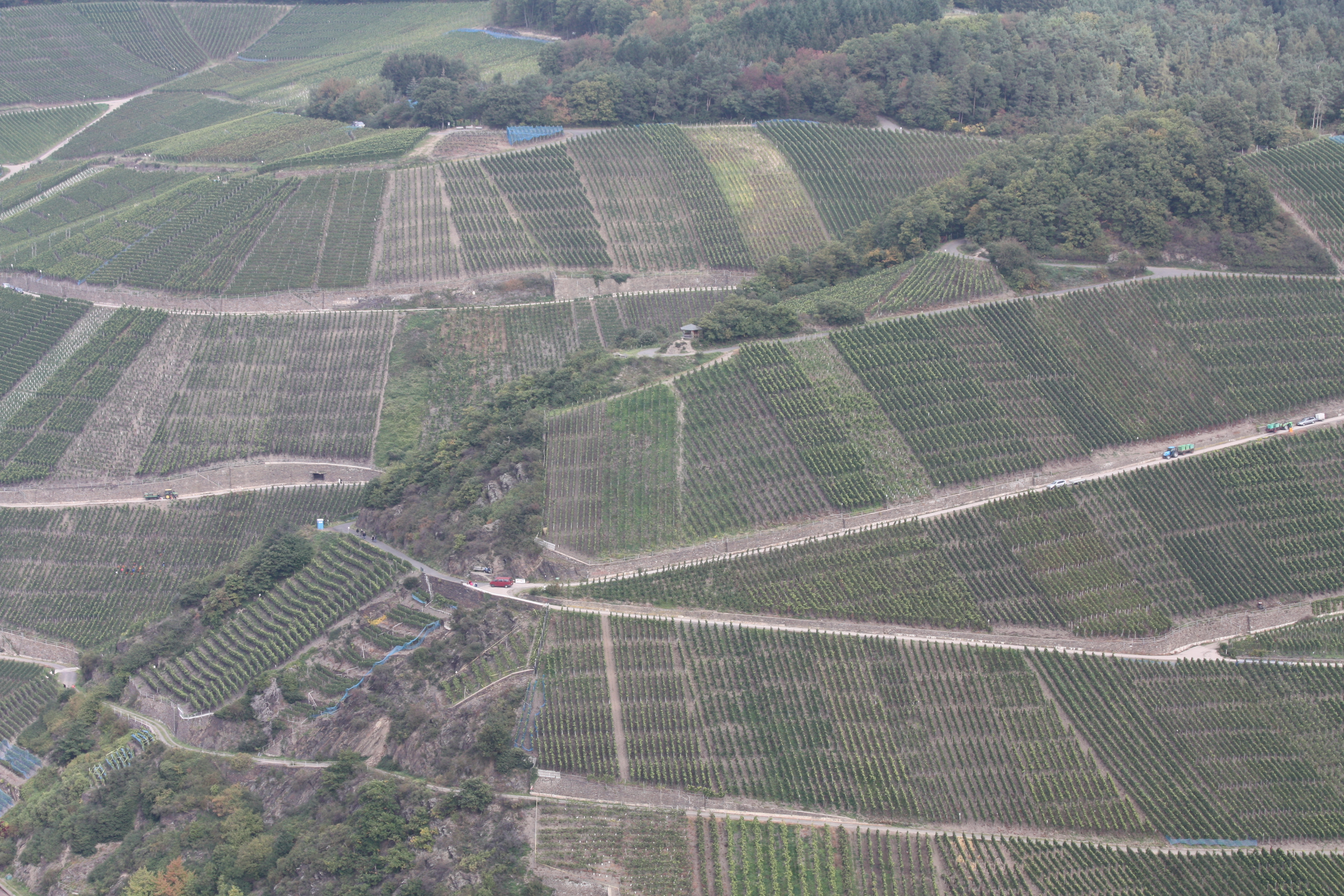 Weinberg oberhalb von Dernau vom Krausbergturm fotografiert.